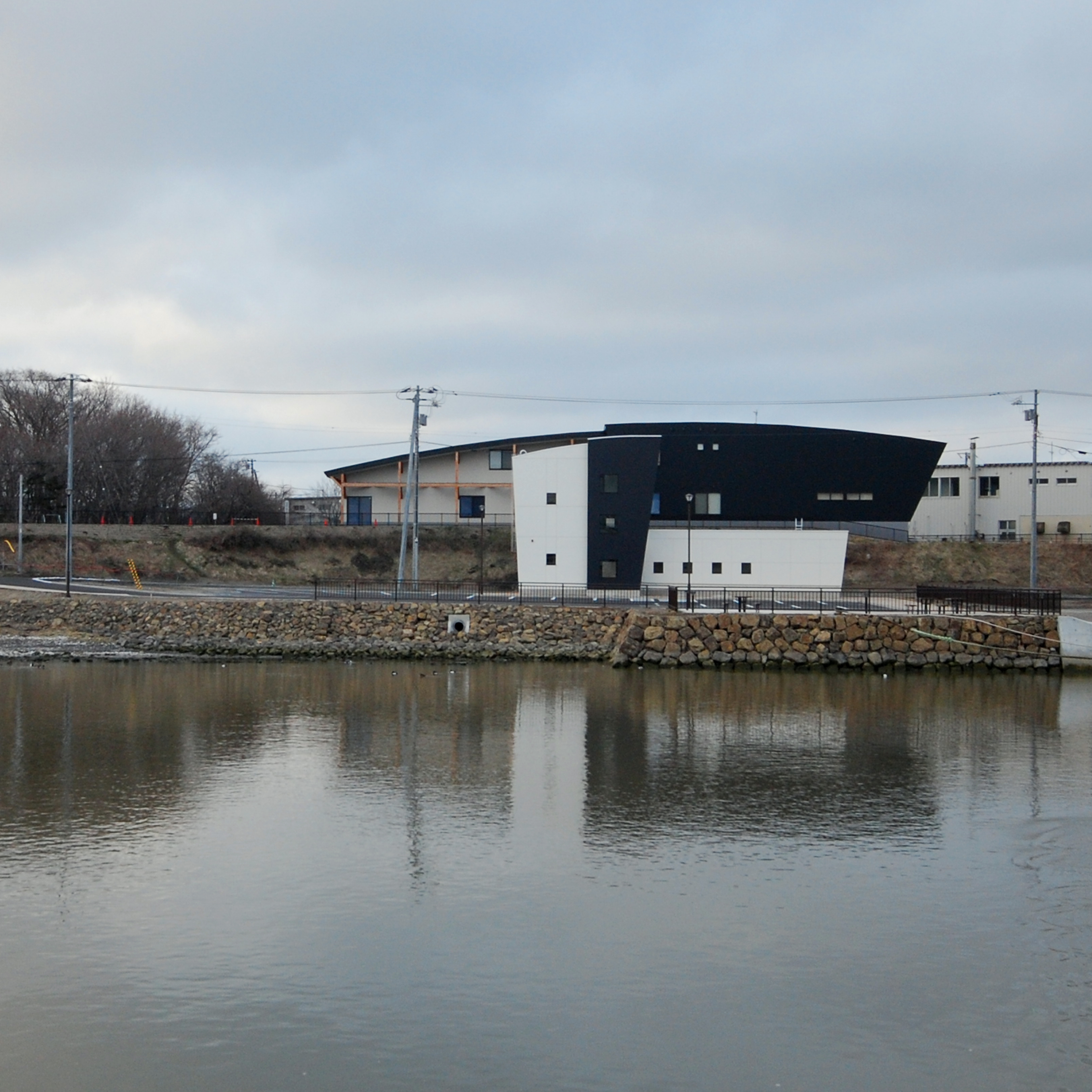 2013年4月現在のモヨロ貝塚館の形です。